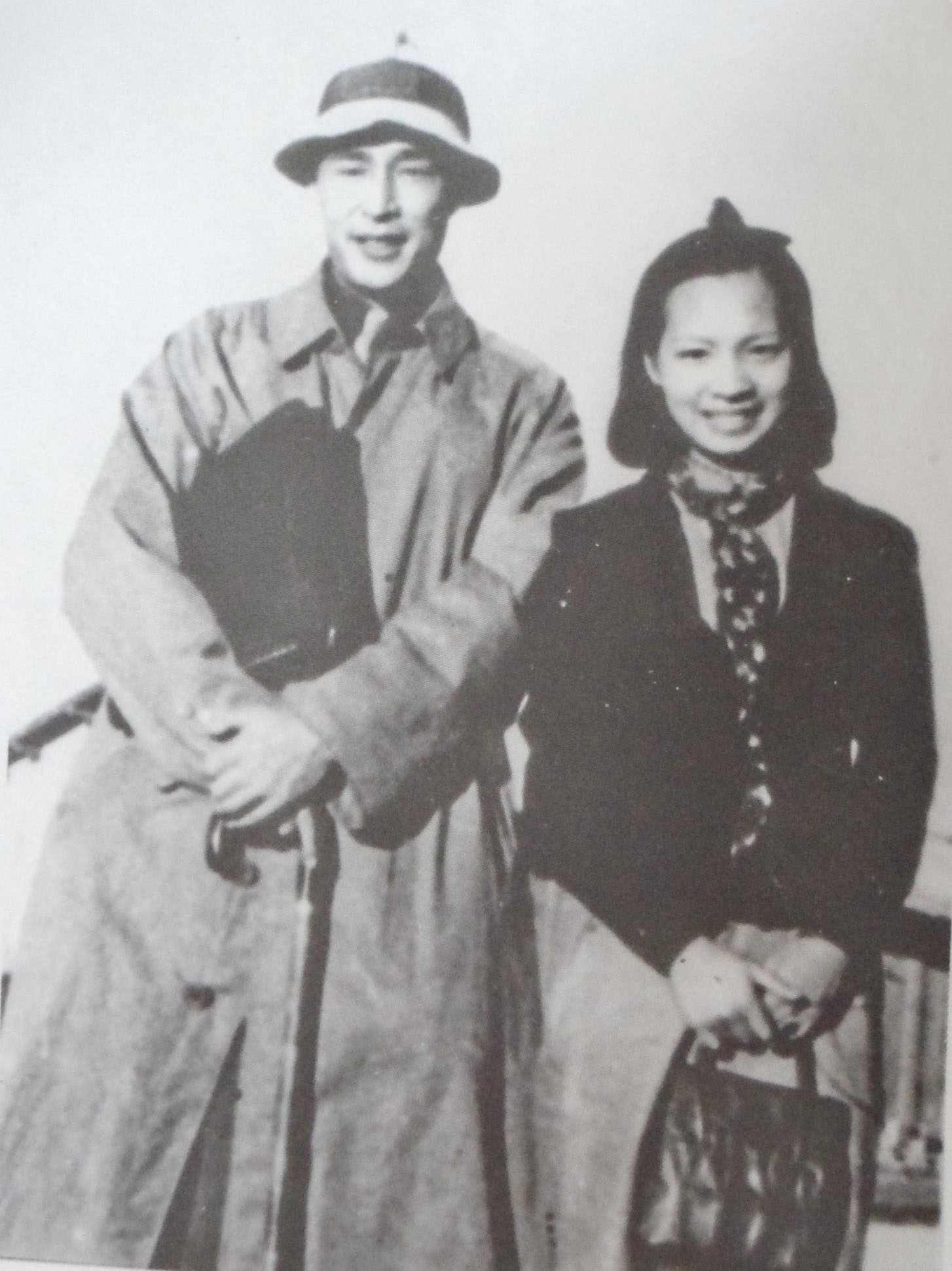 金焰与王人美1938年离开上海去香港